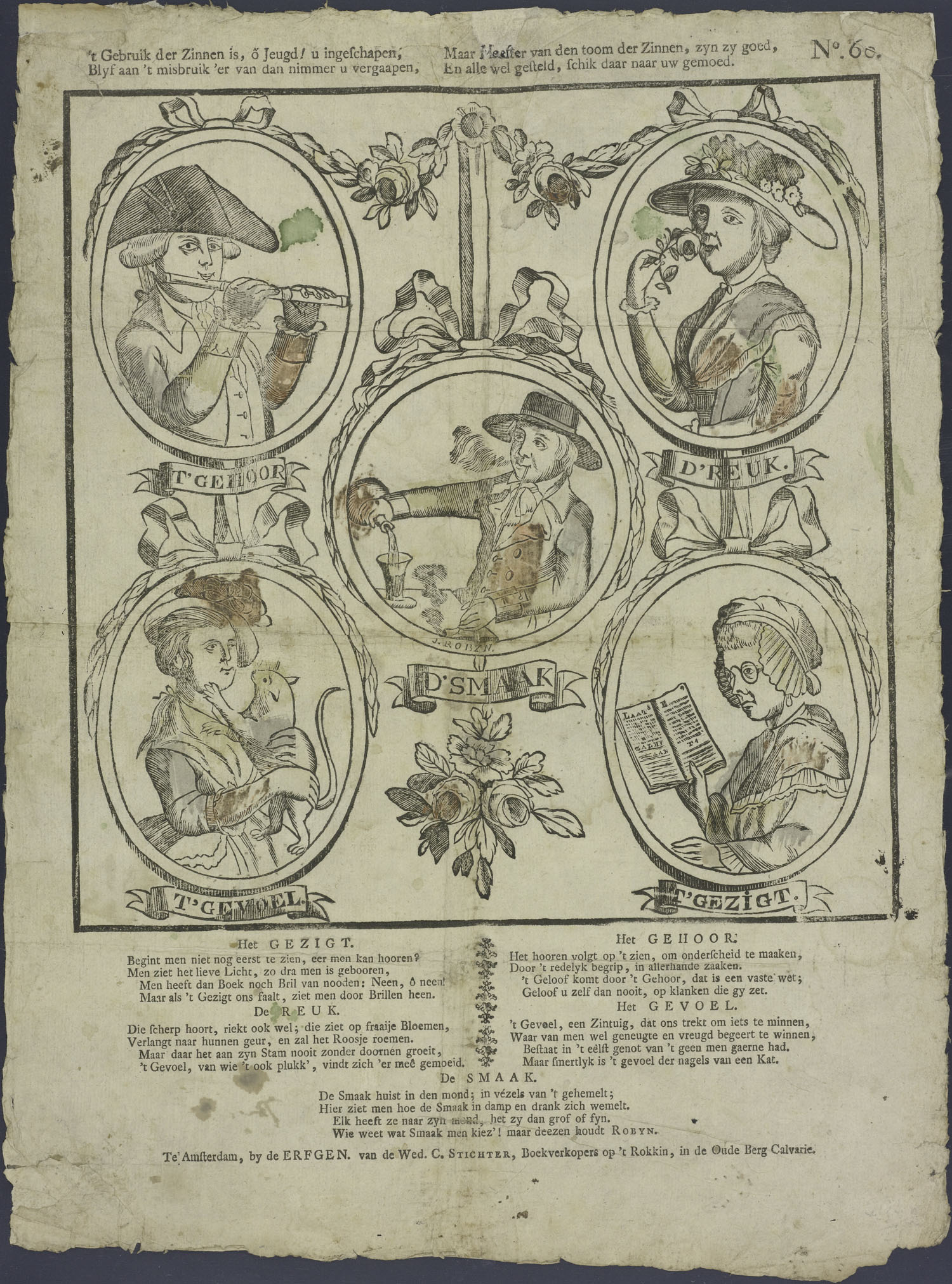 Centsprent met 1 houtsnede, met daarin vijf cirkels, omgeven door versieringen met linten en bloemen, met in elke cirkel een afbeeldingen van een persoon die het zintuig verbeeldt: bij het gehoor staat een man met dwarsfluit; bij de reuk een vrouw met bloem; bij de smaak een man met pijp en drank; bij het gevoel een vrouw met kat; bij het gezicht een vrouw met boek. Bevat vijf vierregelige rijmende onderschriften.